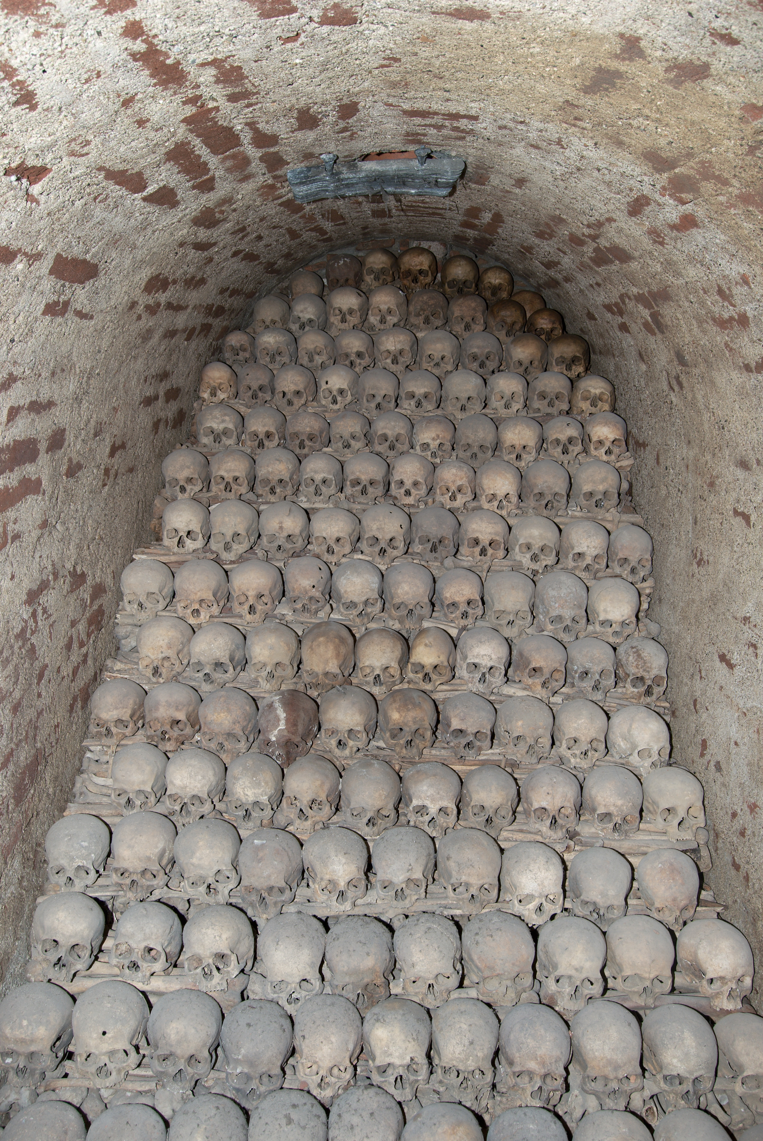 Česky: Kostnice pod brněnským kostelem sv. Jakuba